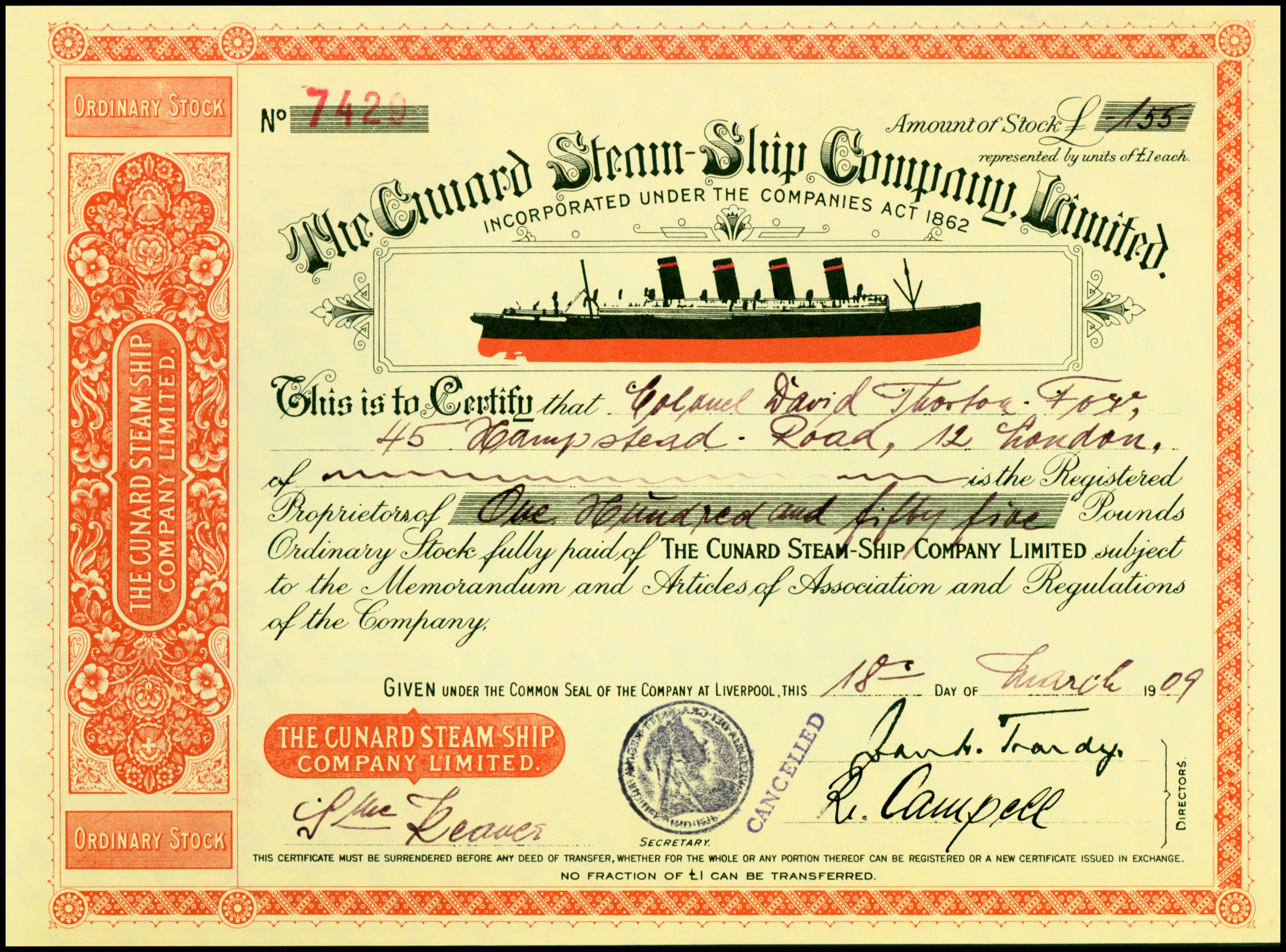 Aktie der Cunard Steamship Company Ltd von 1909 - Fälschung!; aus dem Fundus des Ersten Deutschen Historic-Actien-Museum e.V. (EDHAM), Kürnbach